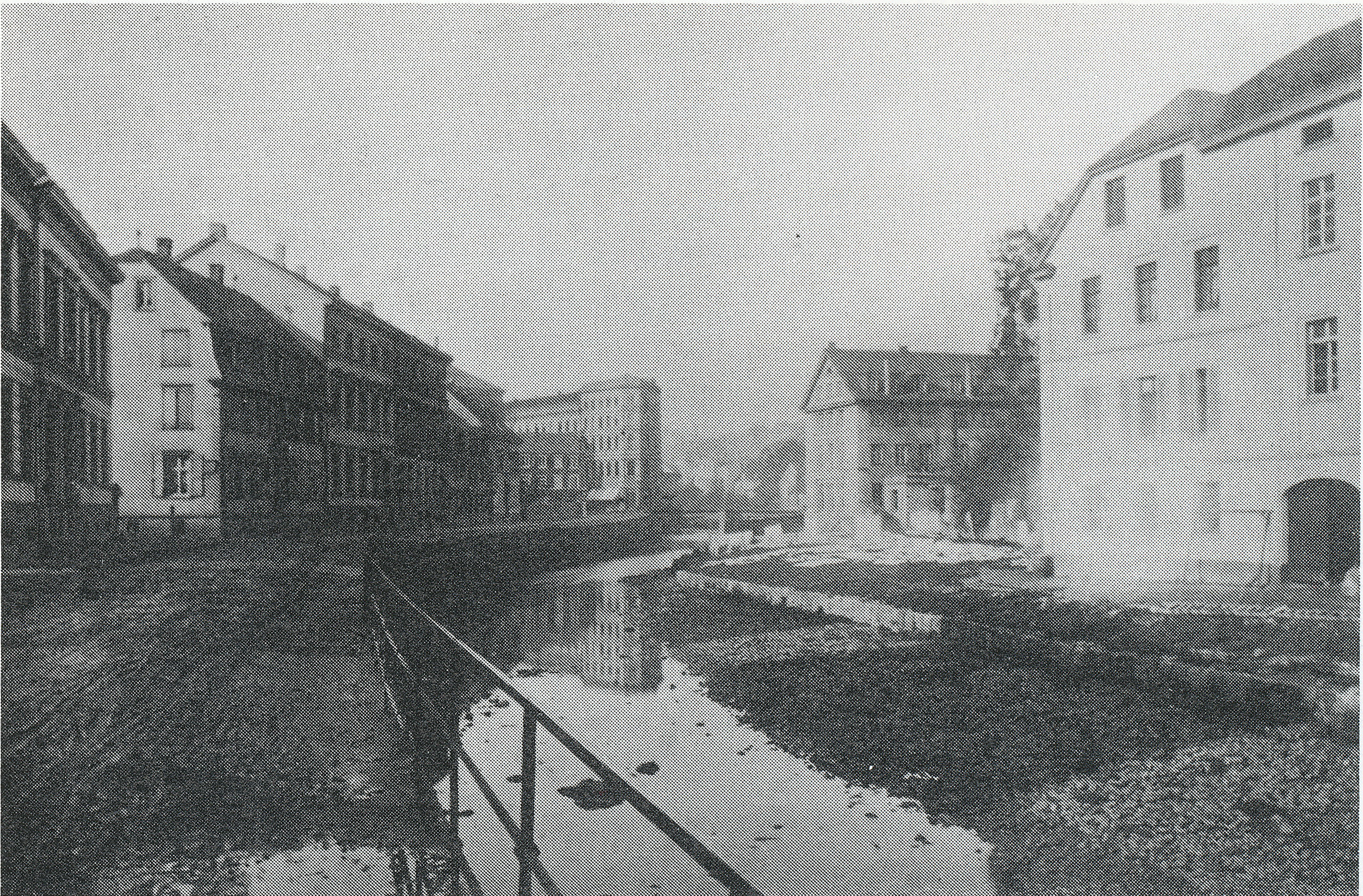 Clefer Bollwerk, Wuppertal